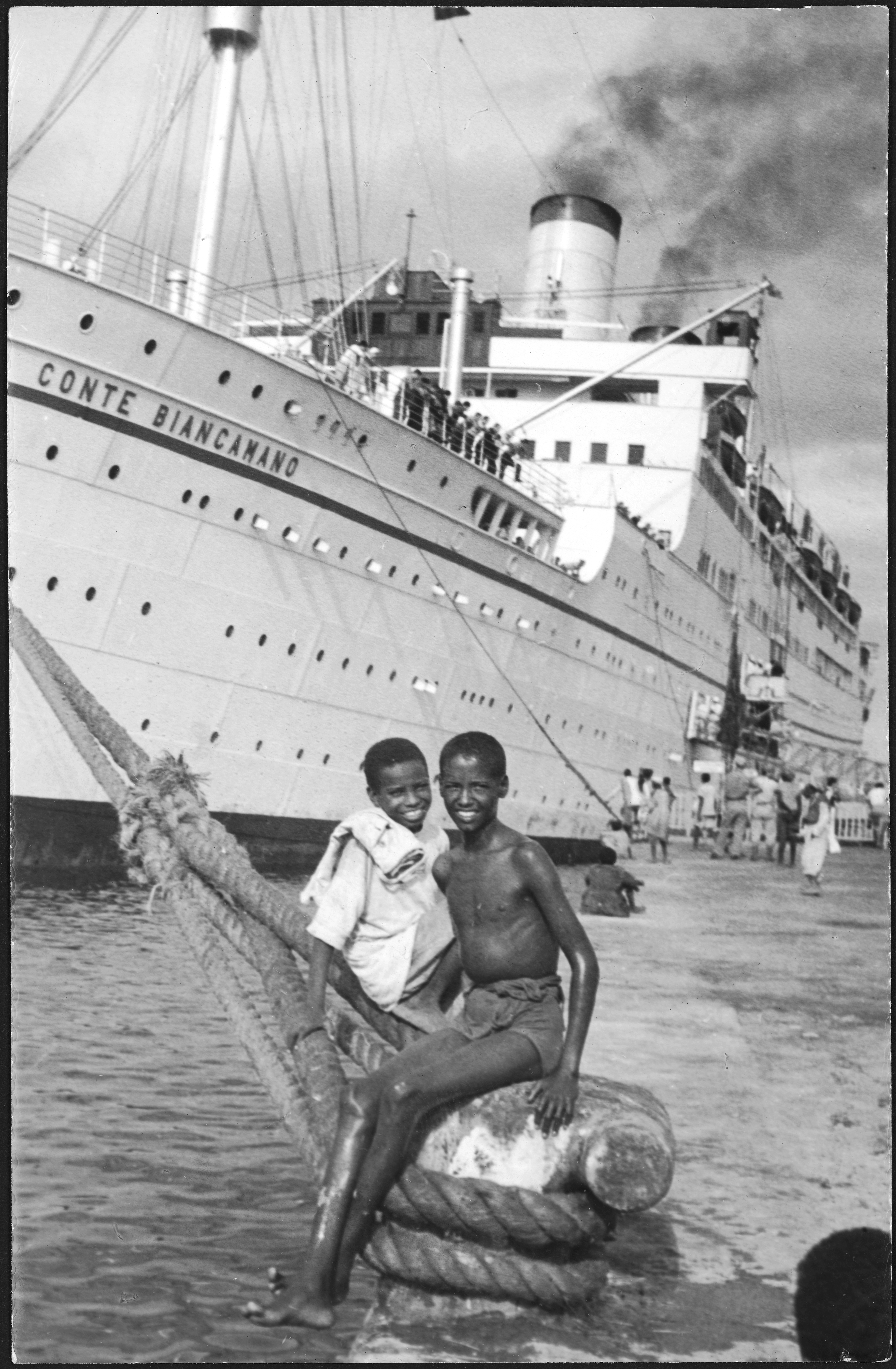 Italienisch-Ostafrika, Massana (Massawa, Massaua): Hafen; Zwei Knaben sitzend auf einem Poller, an den die Conte Biancamano angeleint ist